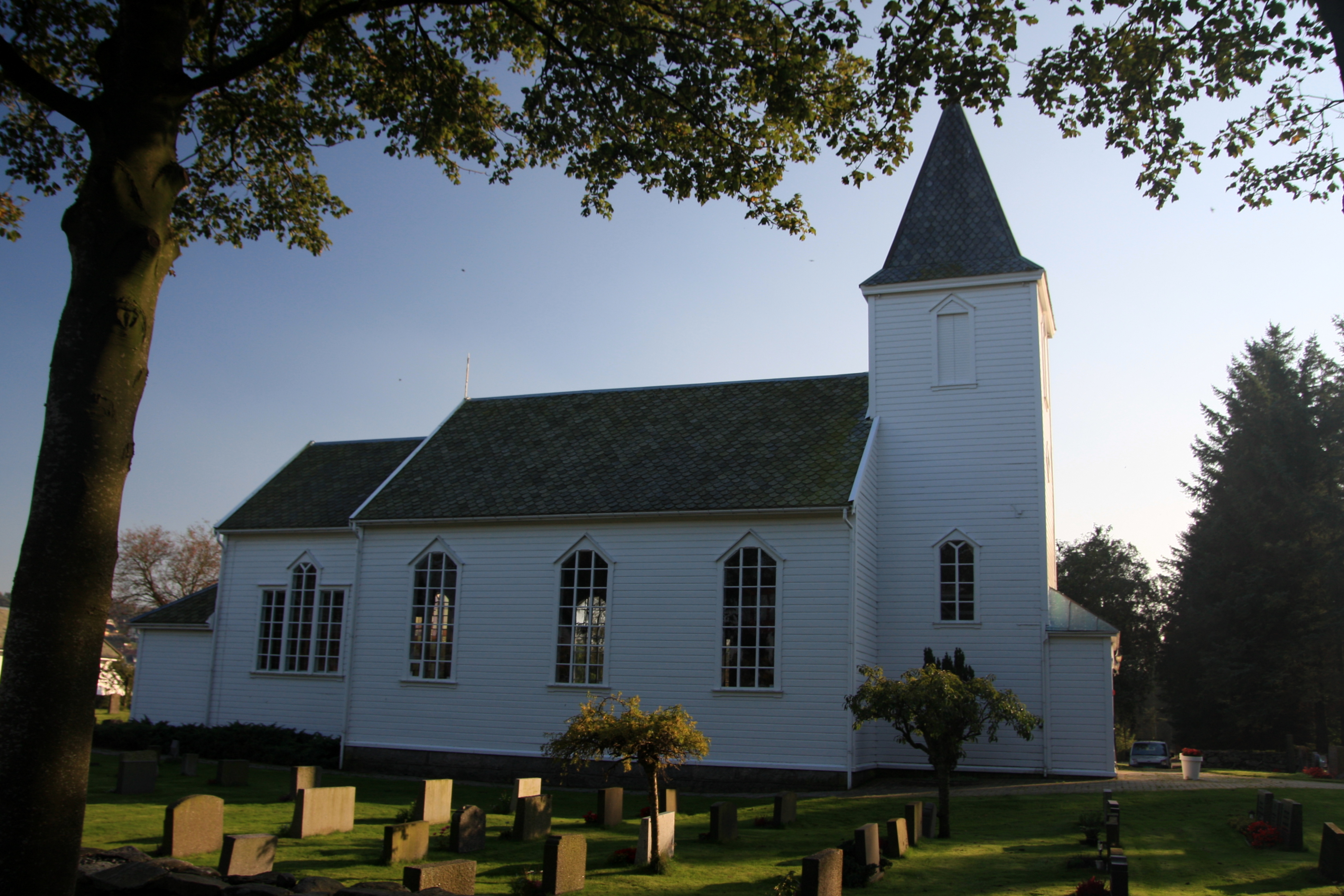 Bore kirke